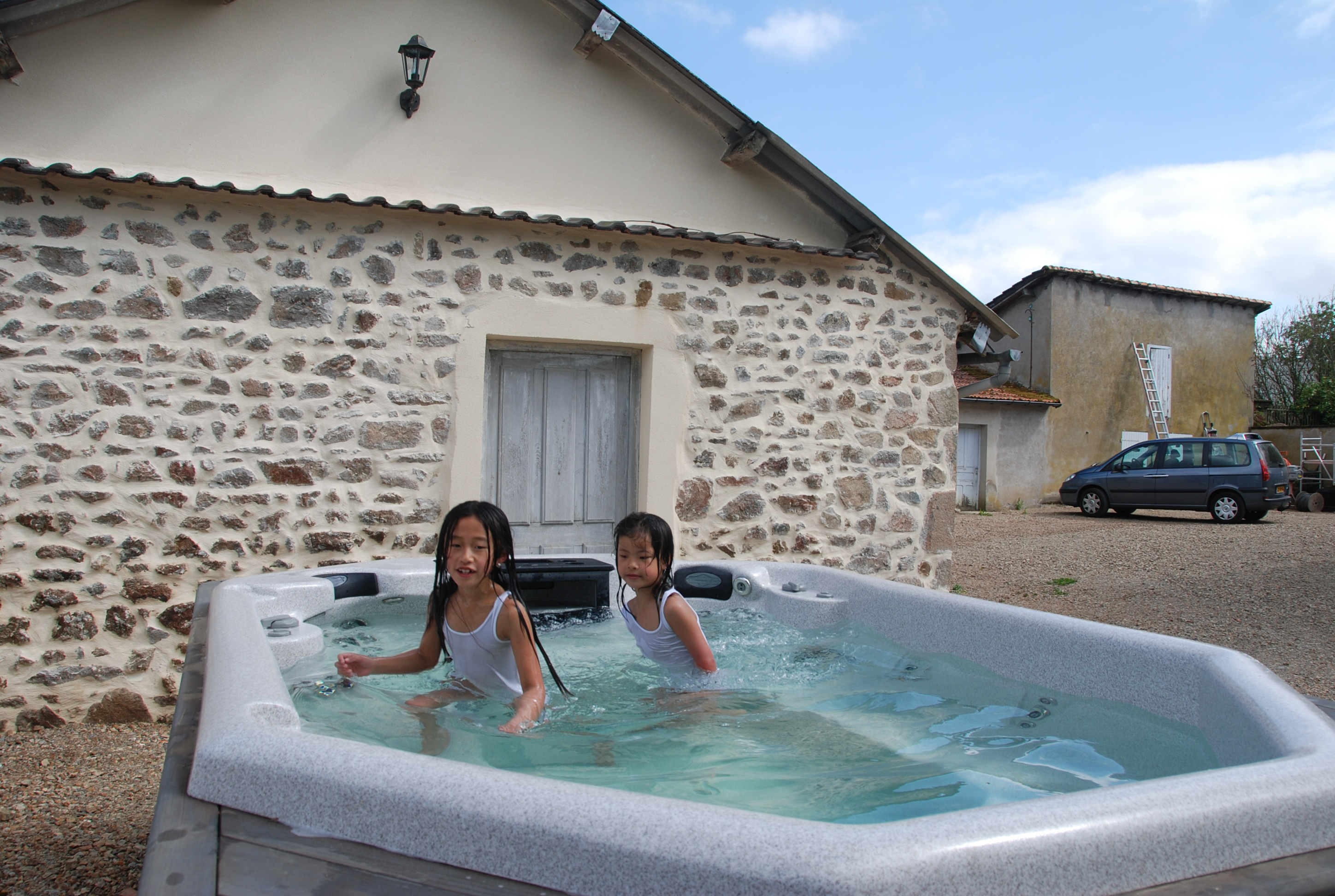 Spa gitesdelacascade